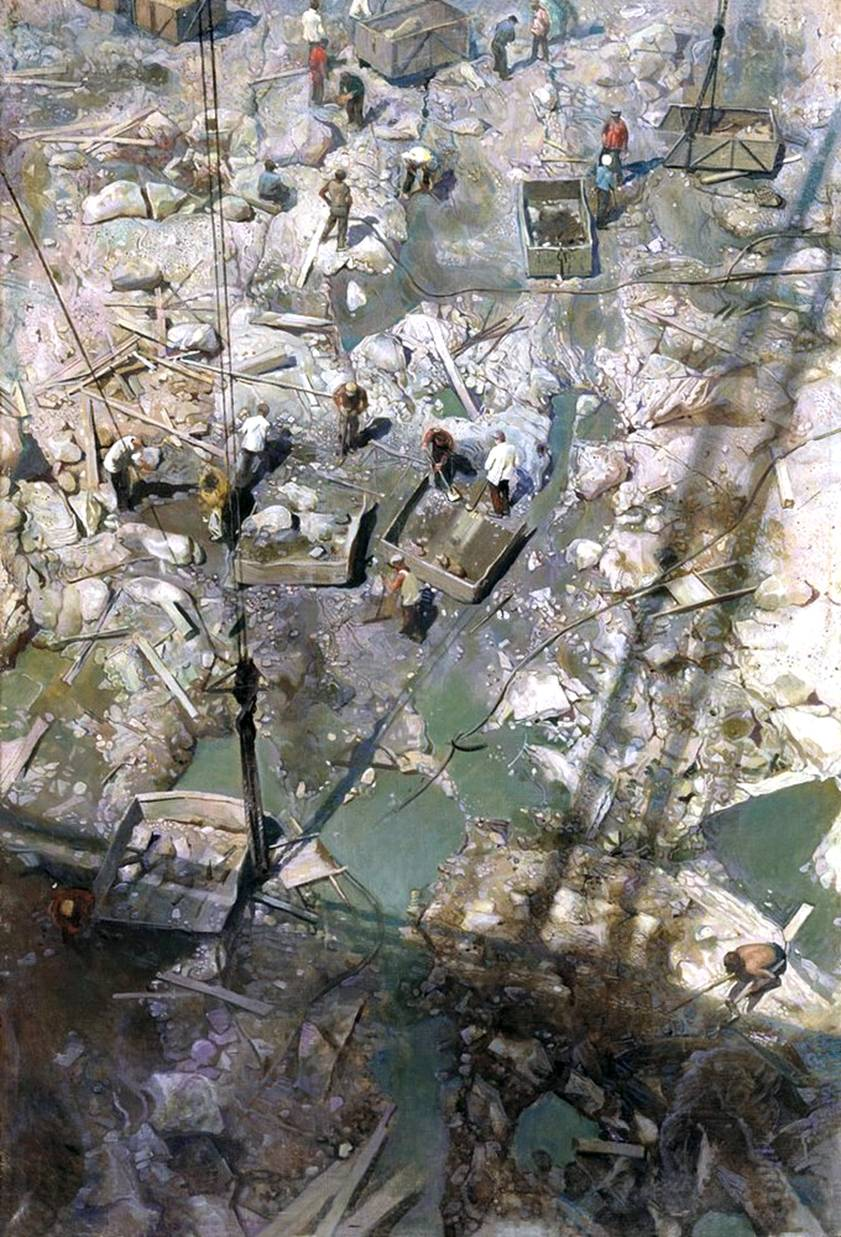 Картина Бродского: Днепрострой